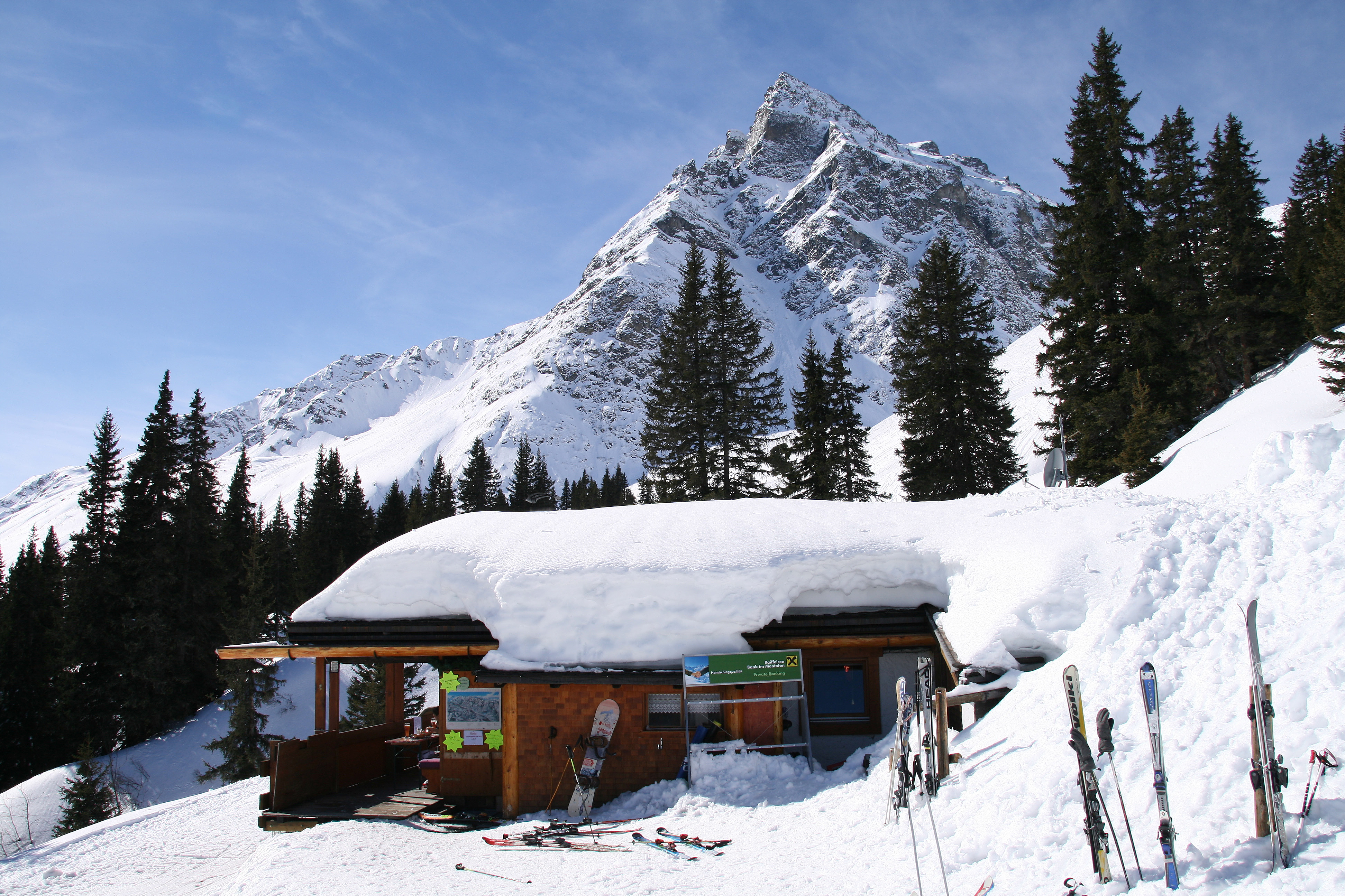 Die "Madrisa 2770m" im Rätikon in Vorarlberg. Blick von der Oberwaldhütte.